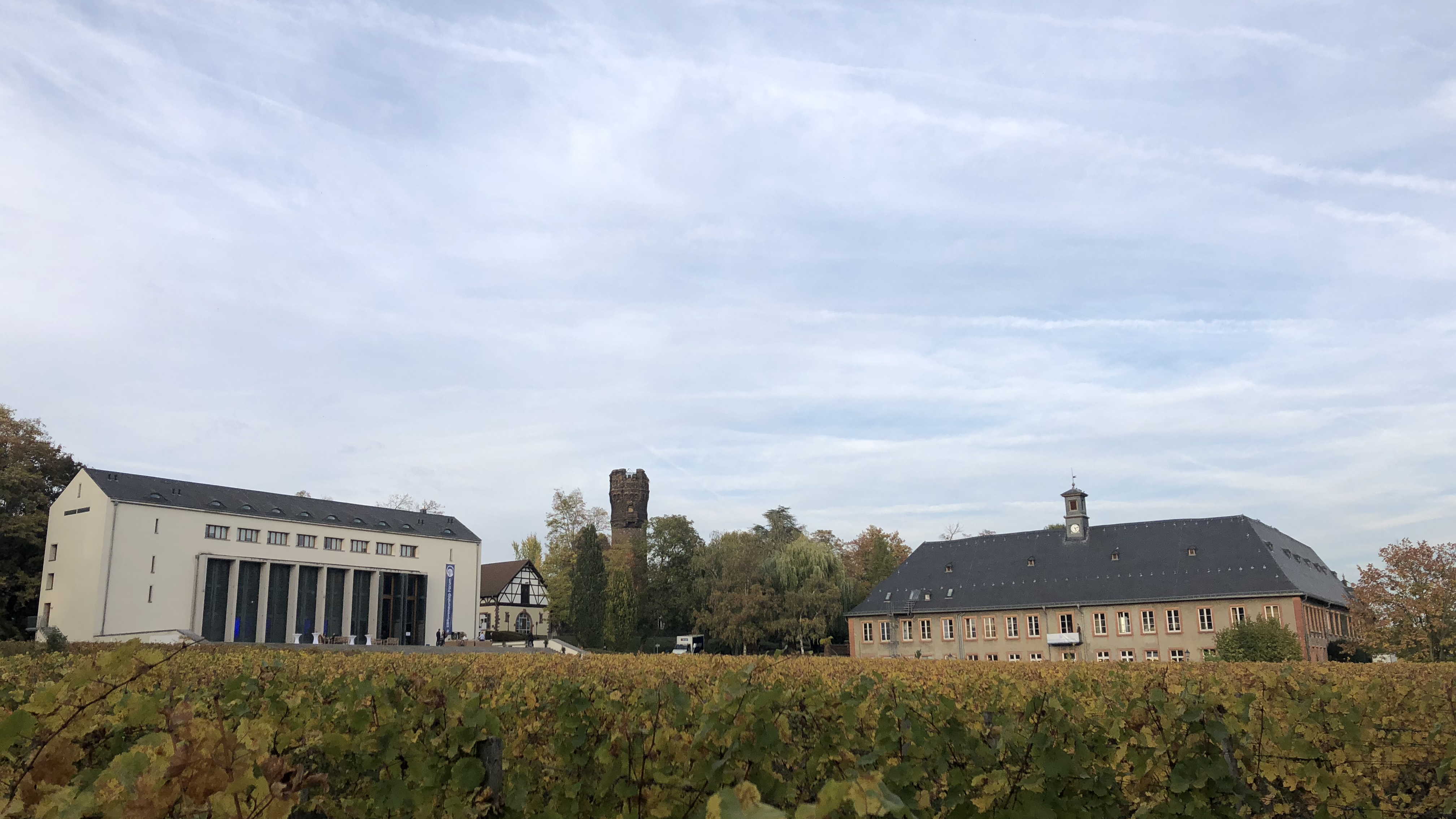 Schloss Reichartshausen vom Rhein gesehen